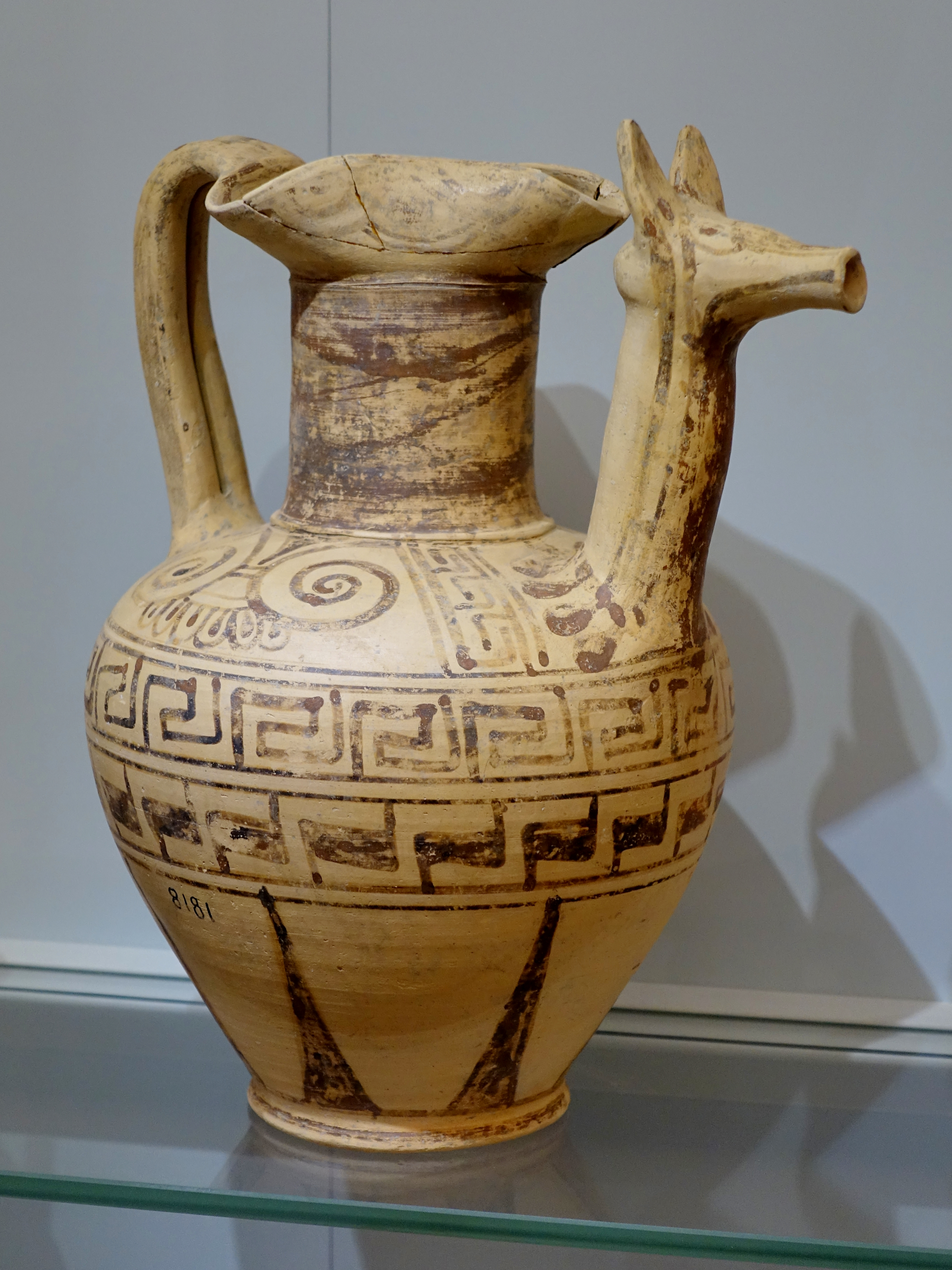 Tongefäß aus der Nekropole von Afrati (frühe archaische Zeit, 7. Jahrhundert v. Chr.), ausgestellt im Archäologischen Museum Iraklio, Kreta, Griechenland